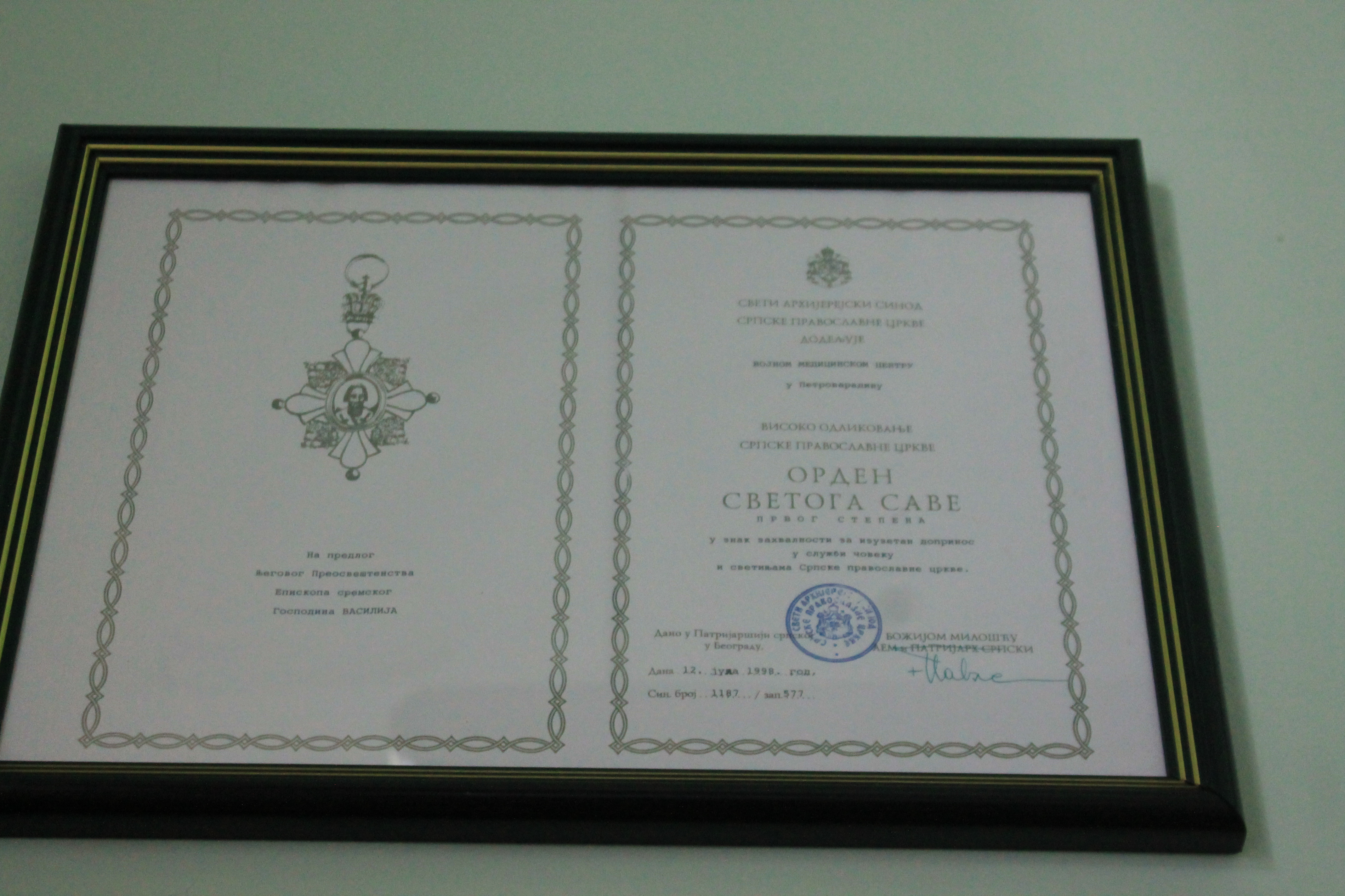 Vojna bolnica Petrovaradin